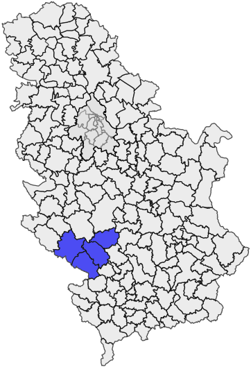 Рашка област